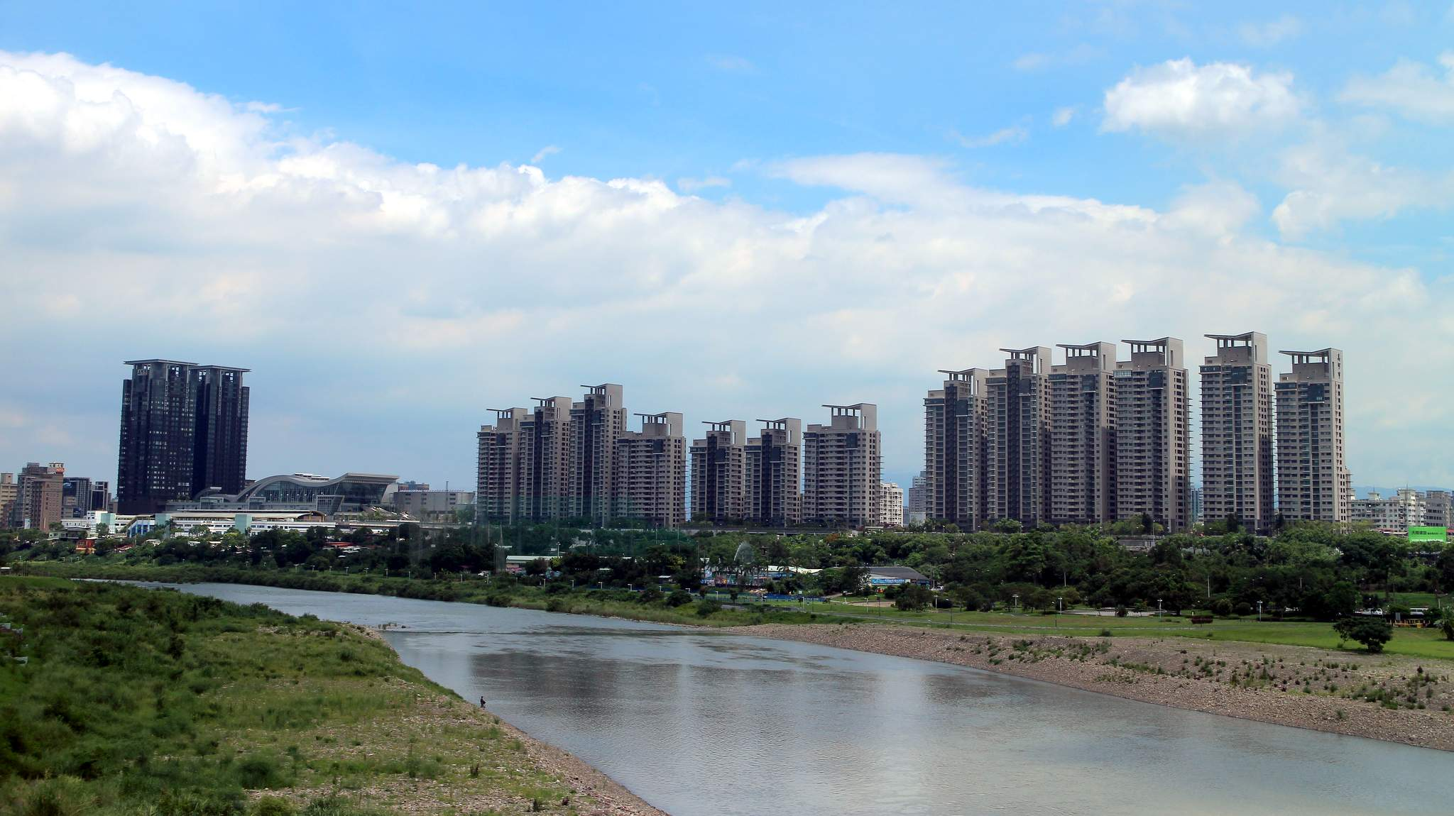 中文（台灣）: 於碧潭大橋上拍攝美河市建築群全景